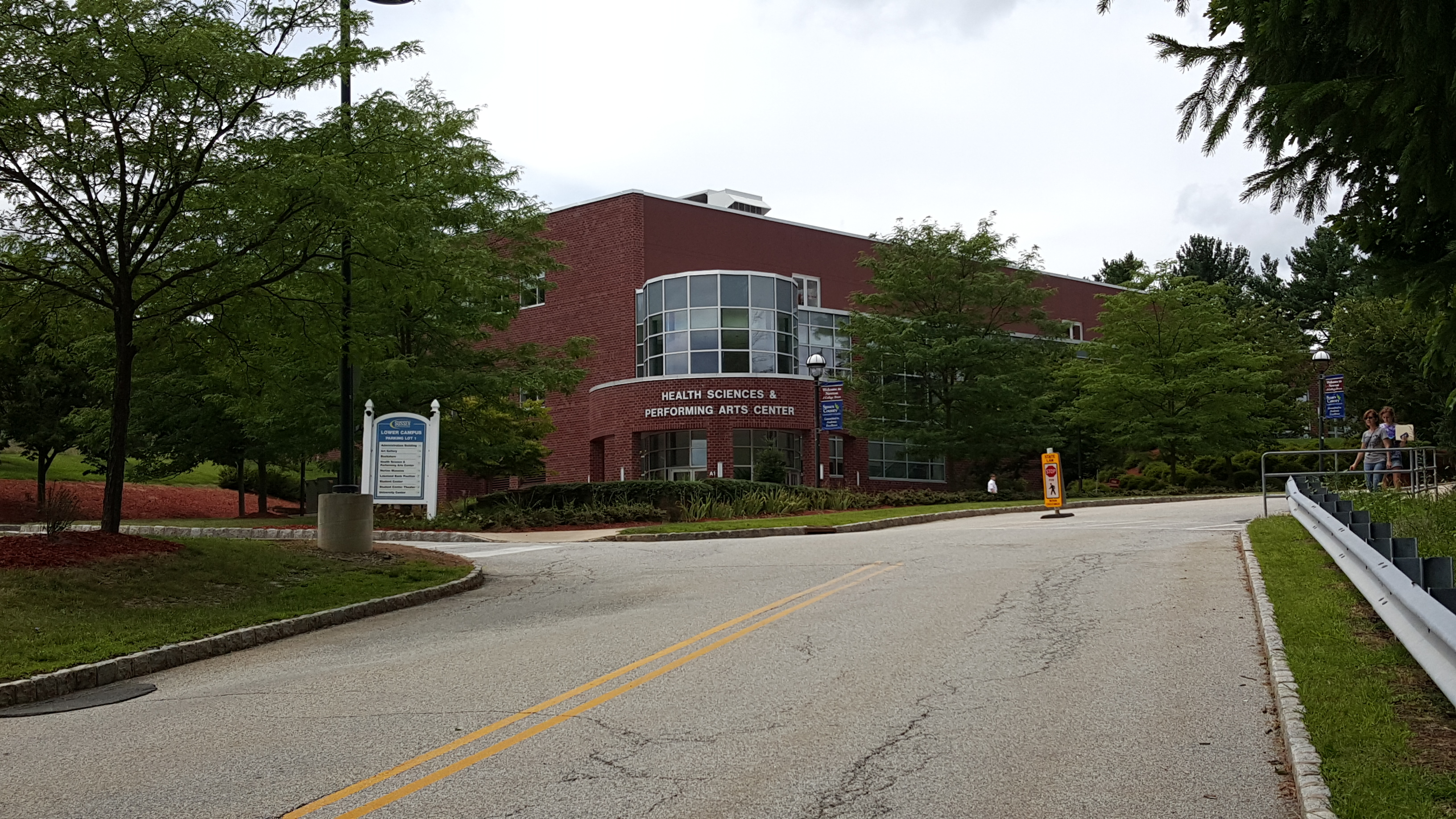 HSB